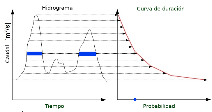 Curva de duracion general. Explicación.